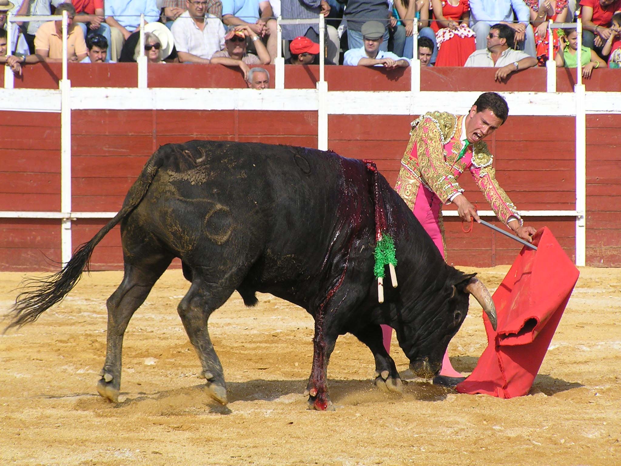 Torero ejecutando un pase ayudado por bajo con la muleta.